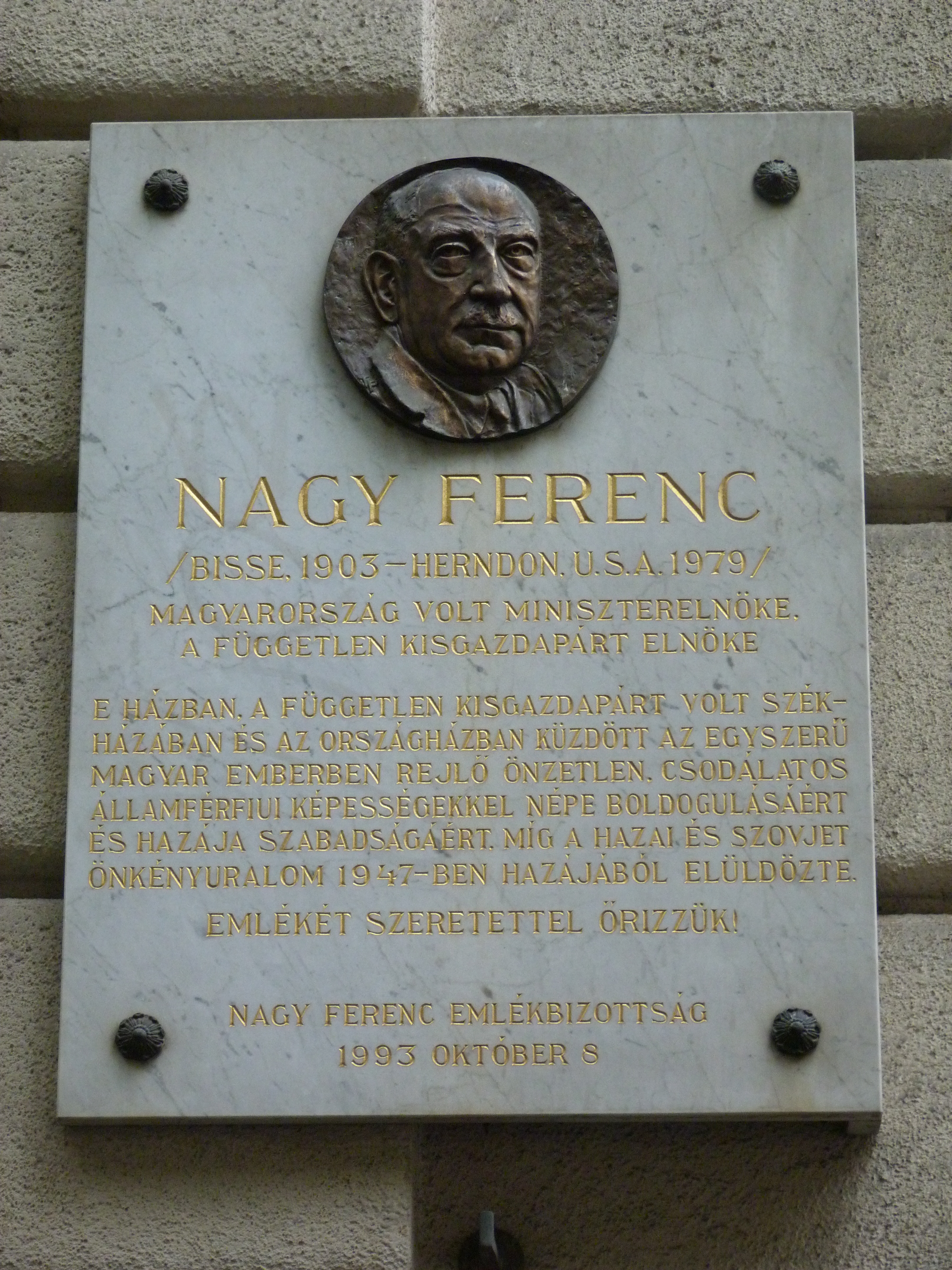 A felvétel 2013. Augustus 26 –án készült Budapesten. Belváros, Semmelweiss u. 1-3 szám. ©© Derzsi Elekes Andor, Budapest, 2013, You are authorised to use these photos and vids under Creative Commons – even for commercial, for profit purposes. Photos must be attributed to Derzsi Elekes Andor. All of the photos and vids in the Metapolisz DVD line are under Creative Commons and can be used even for commercial – for profit – purposes. Recommended Citation Derzsi Elekes A Másik felvétel ugyanerről a tábláról: File:NagyFerenc Semmelweis1.jpg